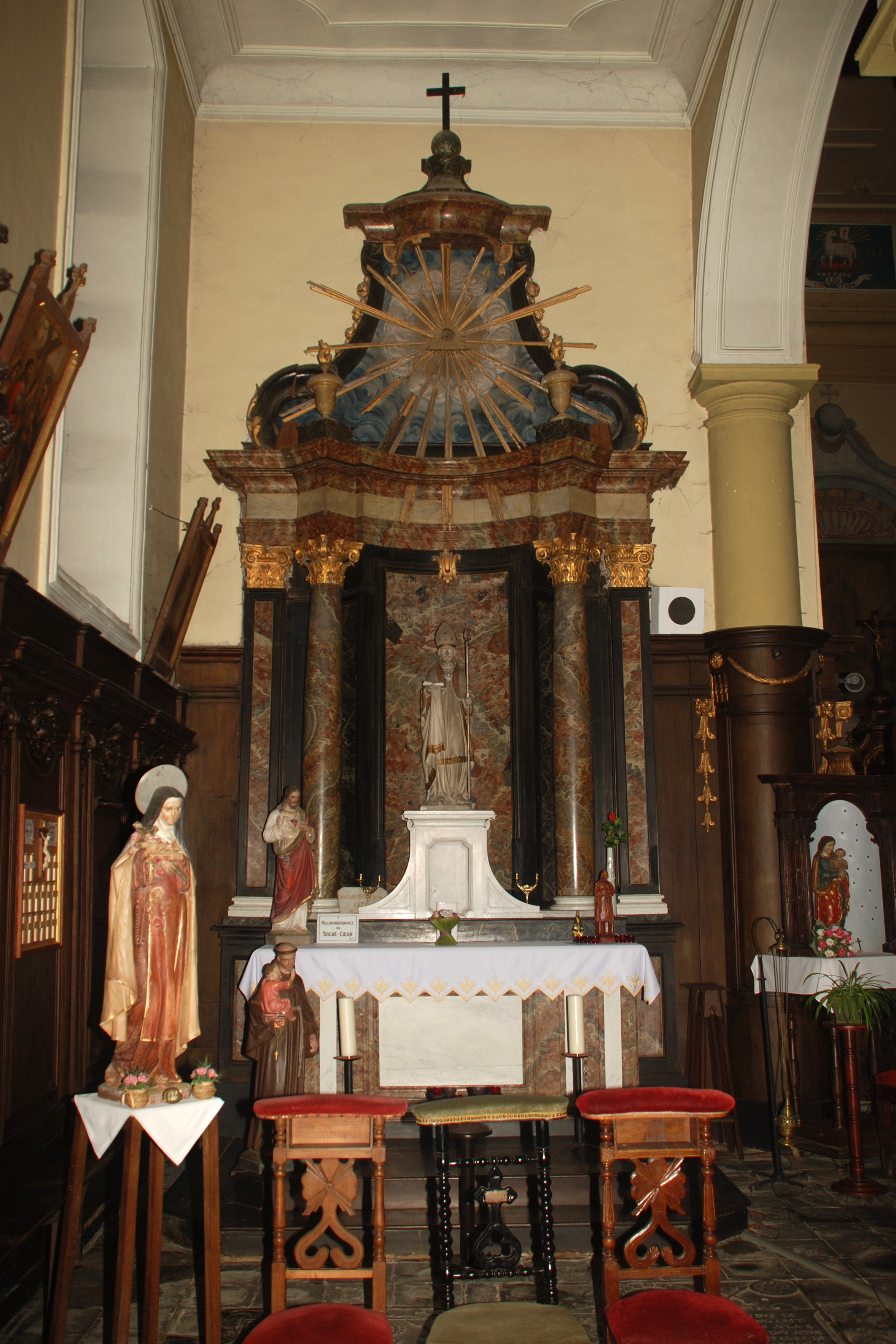 Belgique - Brabant wallon - Église Saint-Martin de Ways